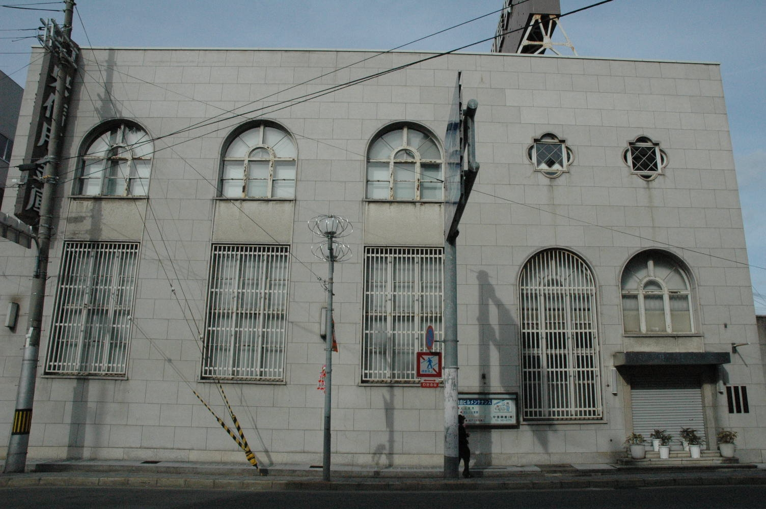 旧 不動貯金銀行七条支店（現 京都中央信用金庫本部別館、京都市下京区、竣工：1930年、設計：関根要太郎）